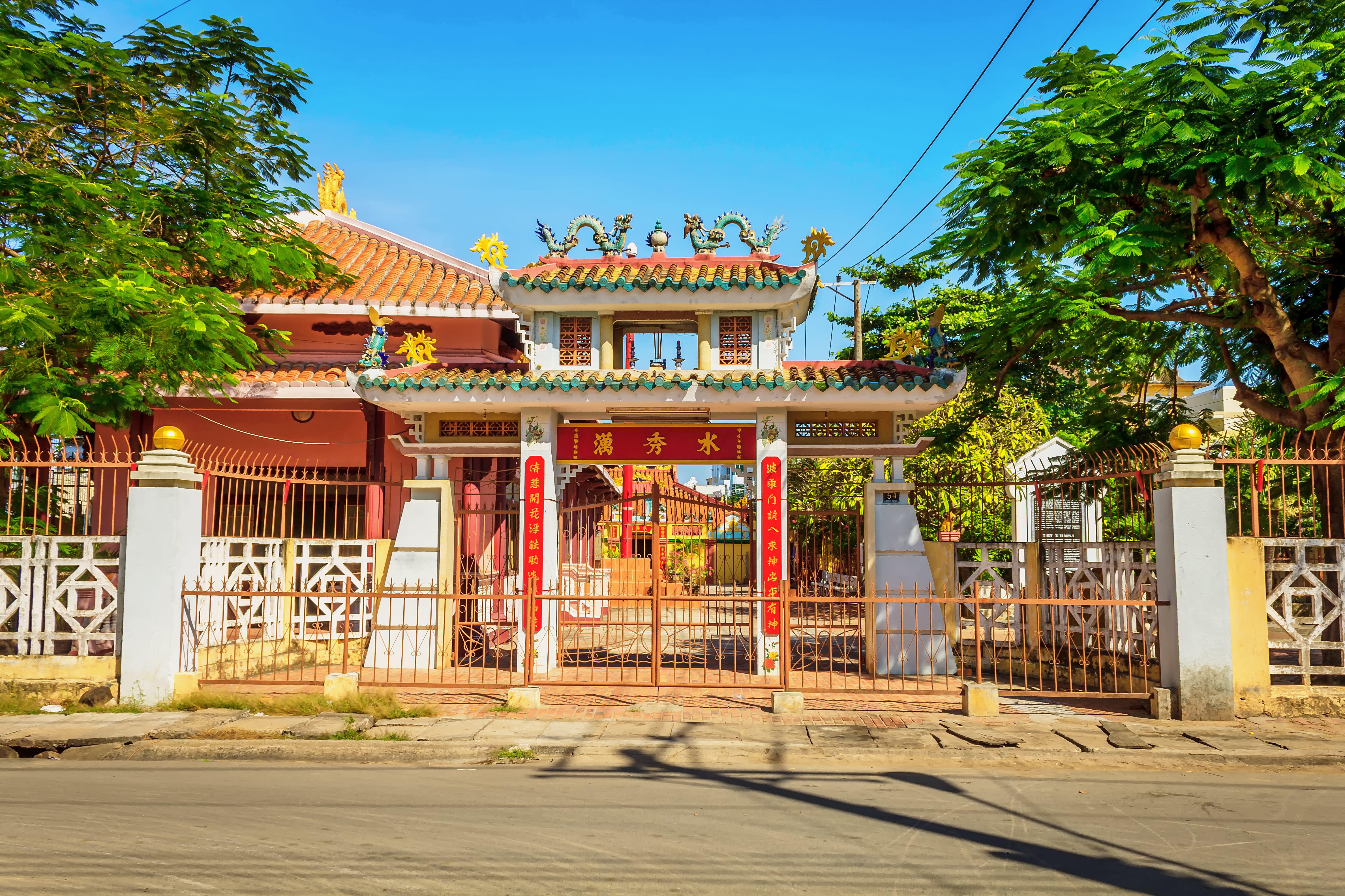 Dinh (hay đình) Vạn Thủy Tú toạ lạc trên đường Ngư Ông, thành phố Phan Thiết, tỉnh Bình Thuận, Việt Nam.